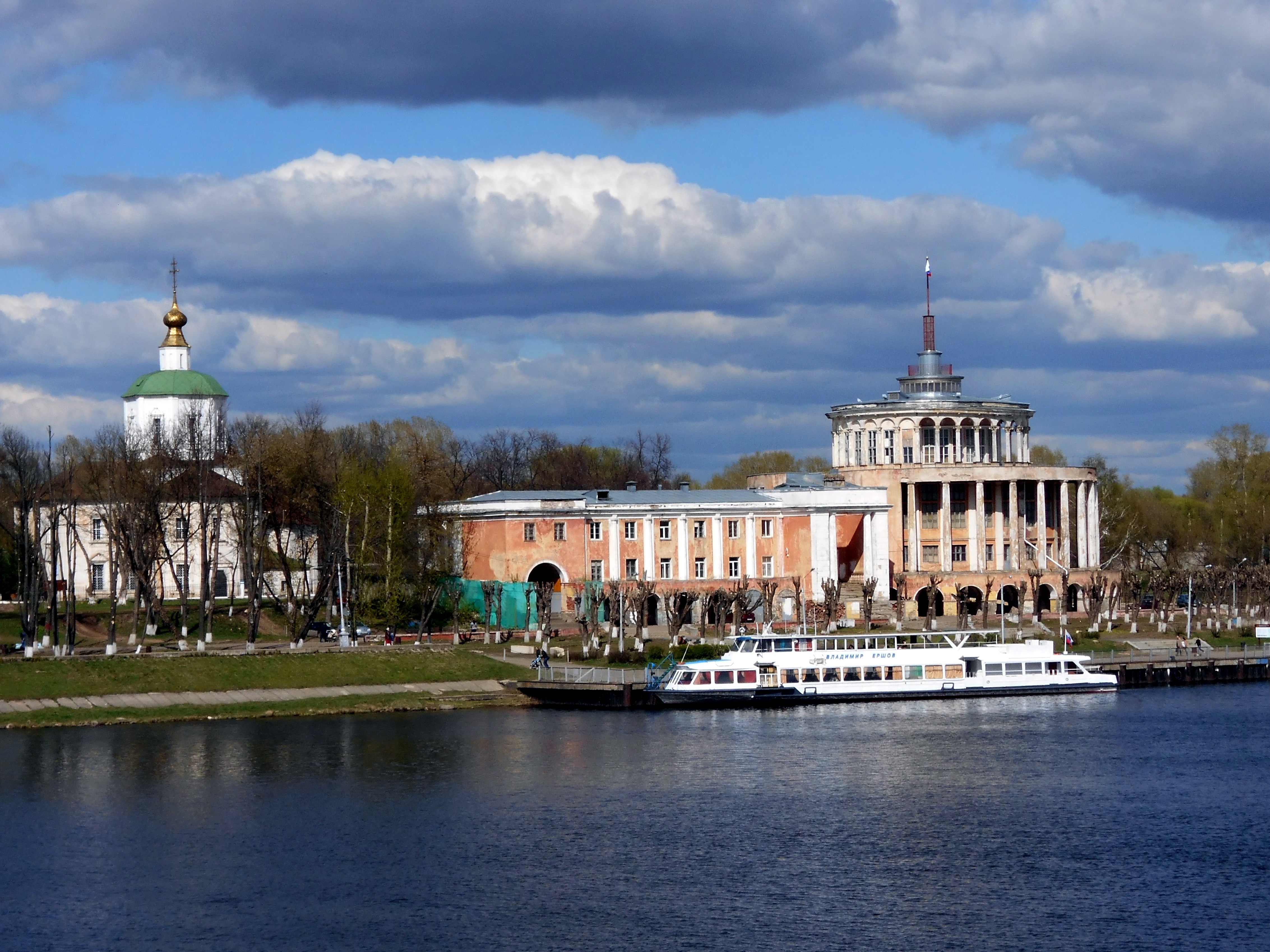 Речной вокзал: набережная Афанасия Никитина, Тверь, Тверская область